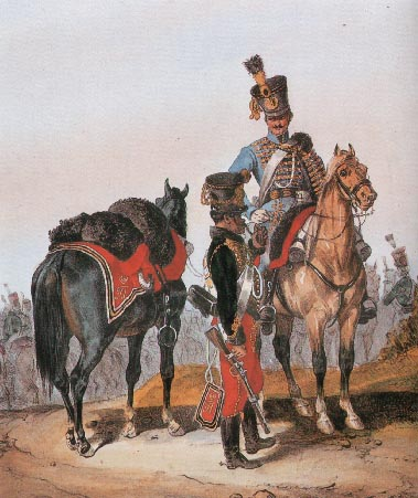 Österreichisch-ungarische Husaren Mitte des 19. Jahrhunderts